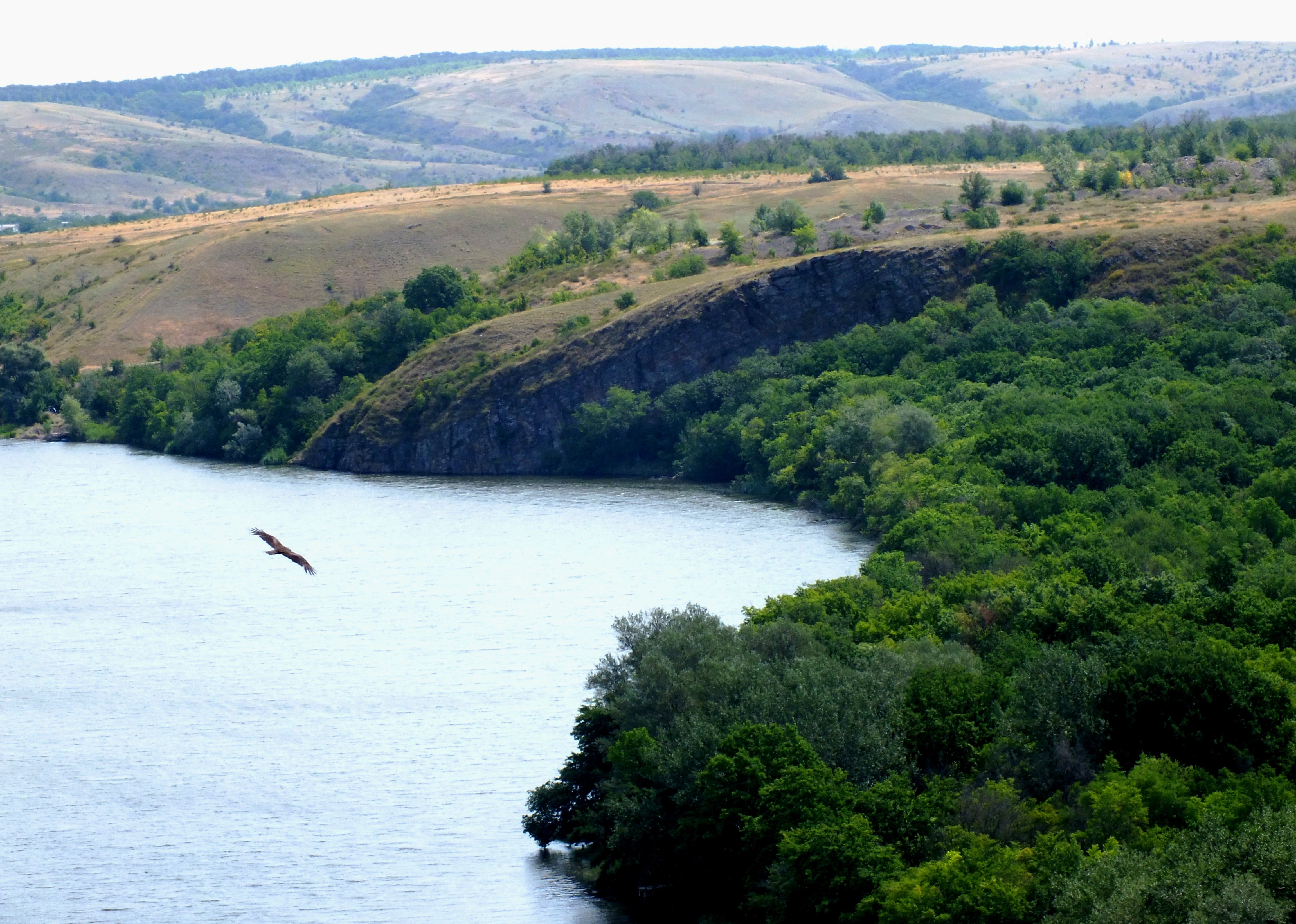 Урочише Хоботок, Каменский район This image is related to the protected area of Russia number 6120041